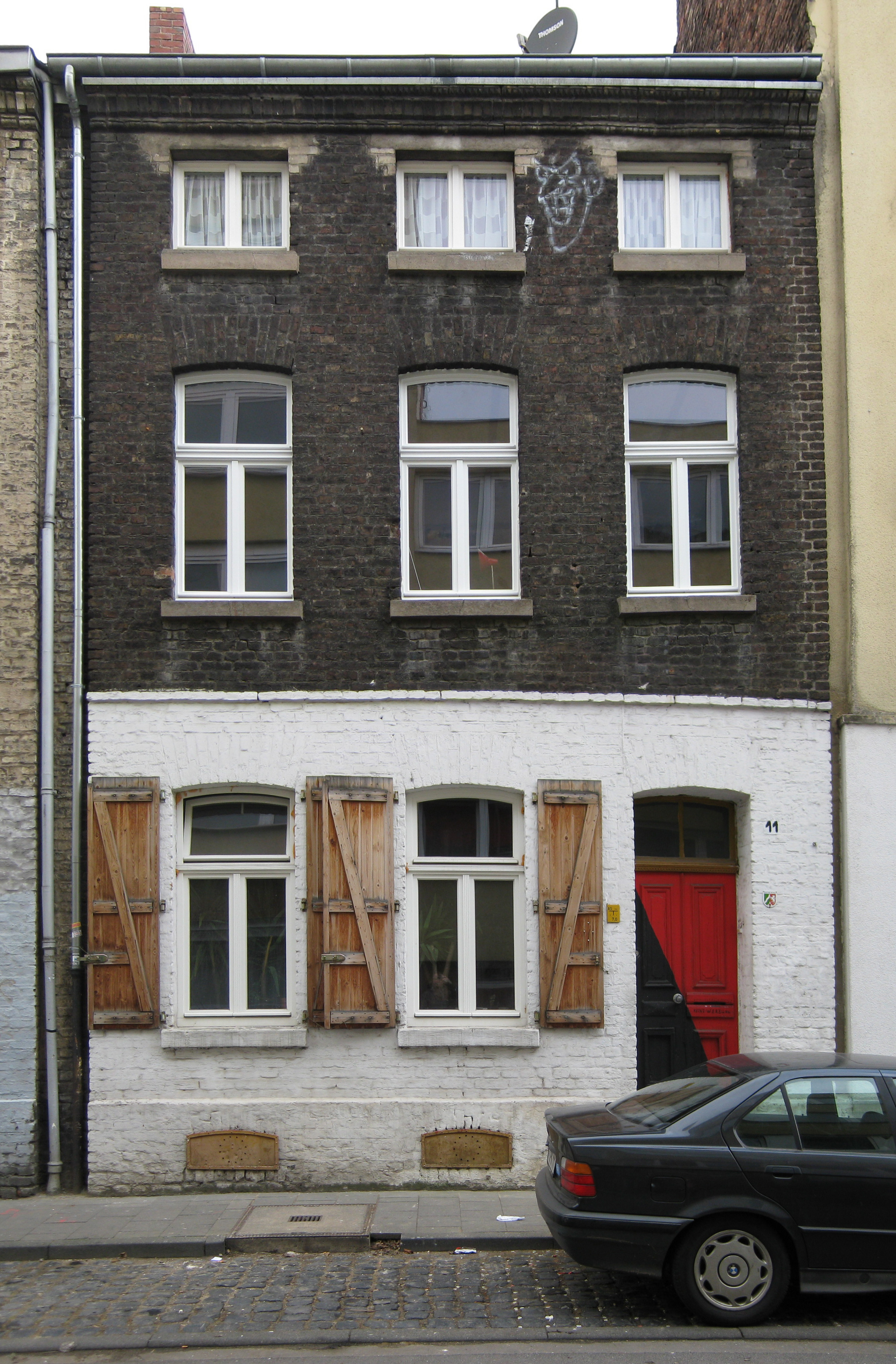 Dreifensterhaus in Köln-Ehrenfeld This is the photograph of an architectural monument. It is part of the list of cultural monuments of Köln, no. 8462